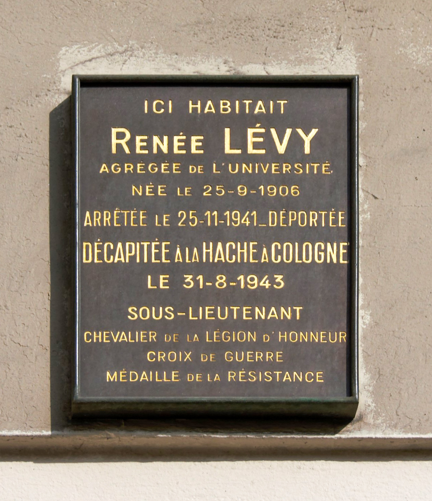 Gedenkplakette für Renée Lévy in der Rue de Normandie n° 6 im Marais im 3. Arrondissement in Paris (Île-de-France/Frankreich)